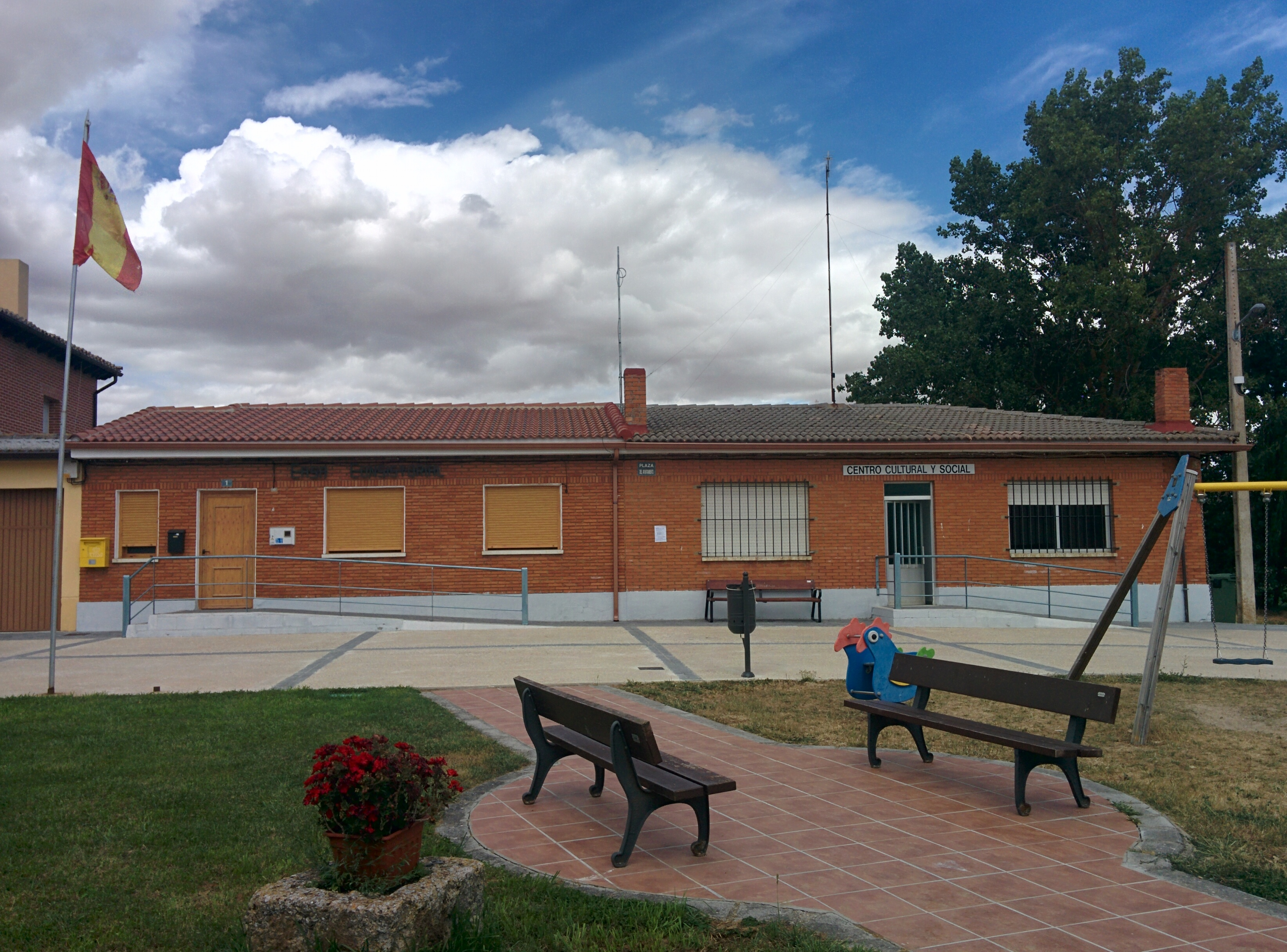 Casa consistorial de Requena de Campos (Palencia, España).